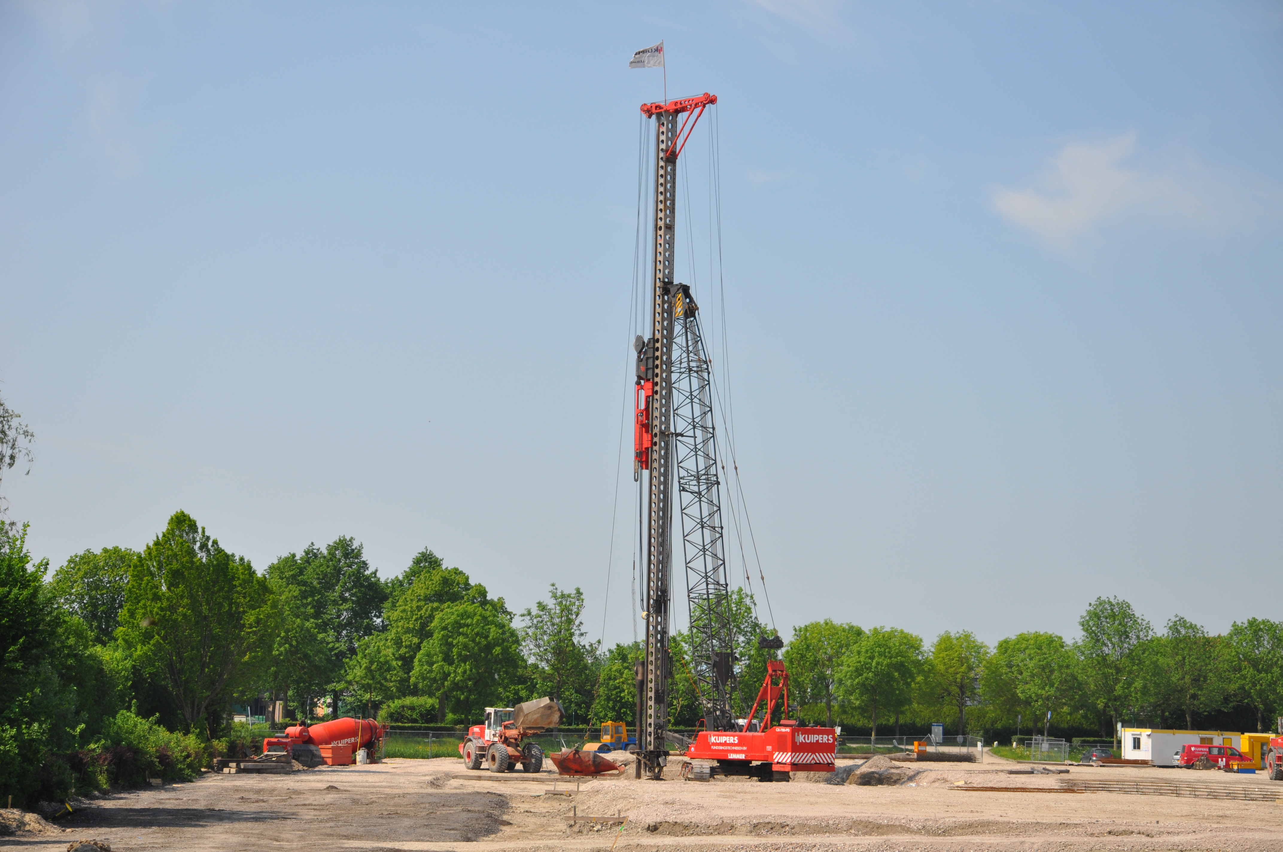 Heimachine in Montfoort.